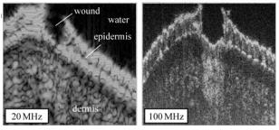 A gauche, l'échographie à 20MHz d'une peau. A droite, l'échographie à 100MHz de la même partie de peau.